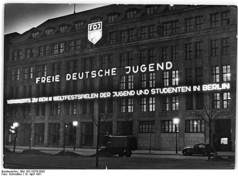 Berlin, Unter den Linden, "Haus der Jugend", Nacht Illus Schmidtke 18.4.51 Das Haus der Jugend in Berlin, Unter den Linden hat zu den Weltfestspielen der Jugend und Studenten eine Leuchtschrift erhalten.